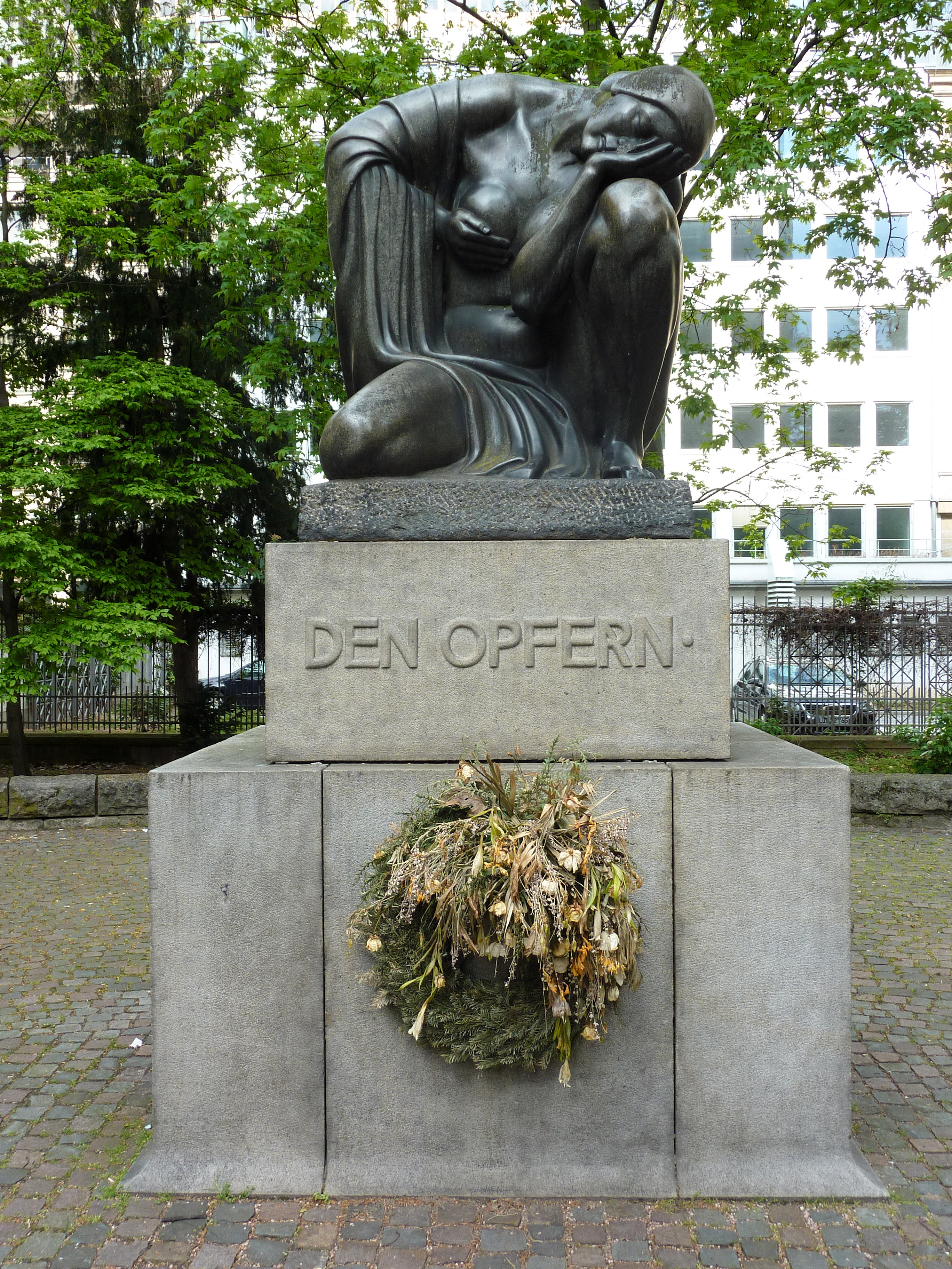 Mahnmal Den Opfern in Frankfurt am Main in der Gallusanlage (Wallanlagen), errichtet 1920. Bronzeplastik „Heldenklage“ von Bildhauer Benno Elkan, geschaffen 1913/1914, auf Granitsockel.